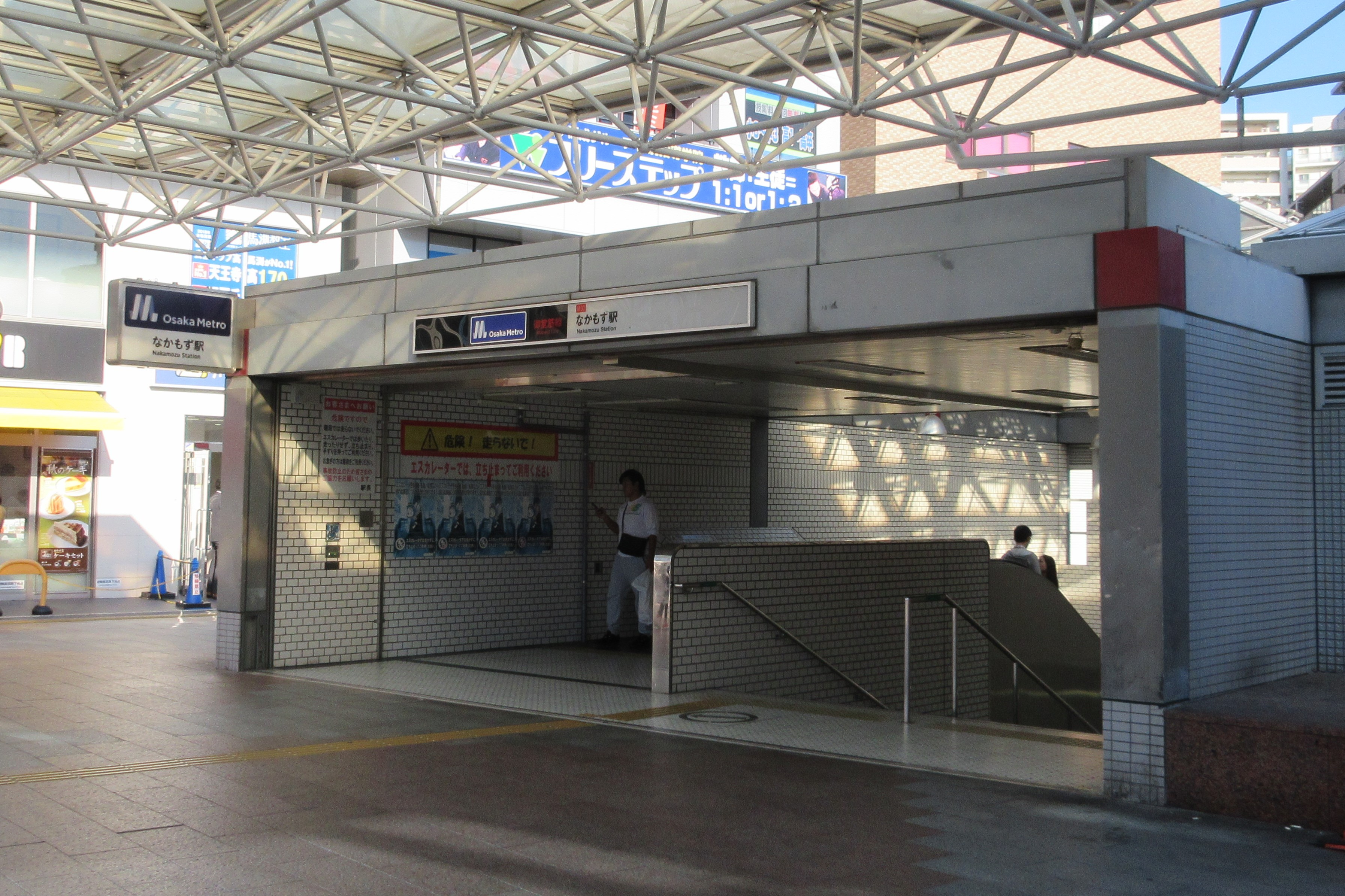 大阪市高速電気軌道（Osaka Metro）なかもず駅